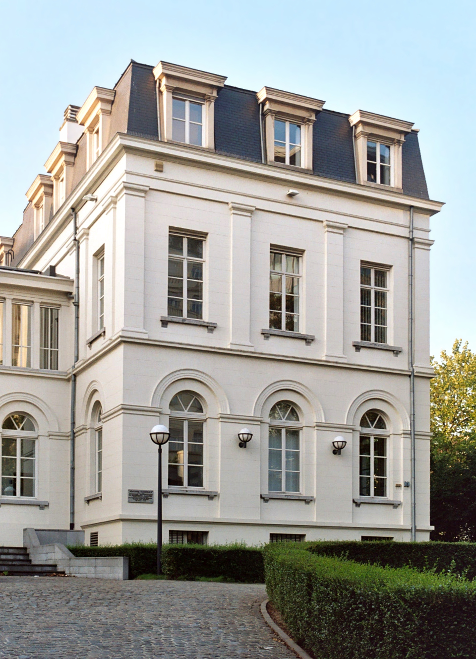 Belgique - Bruxelles - Ancien observatoire royal de Bruxelles